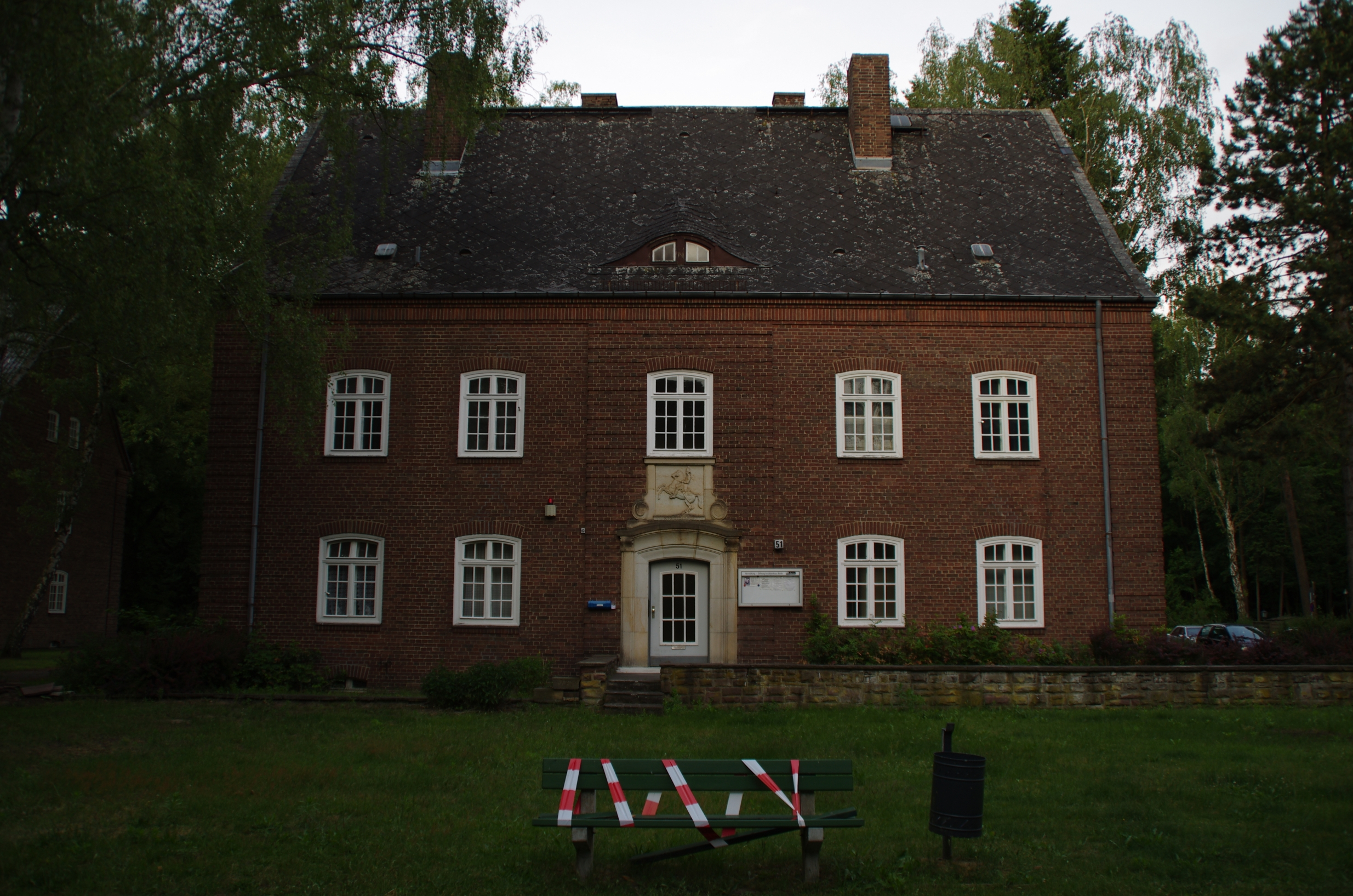 Berlin-Frohnau. Das Haus gehört zur Invalidensiedlung der Stiftung Invalidenhaus Berlin. Das Haus 51 gegenüber der Verwaltung.